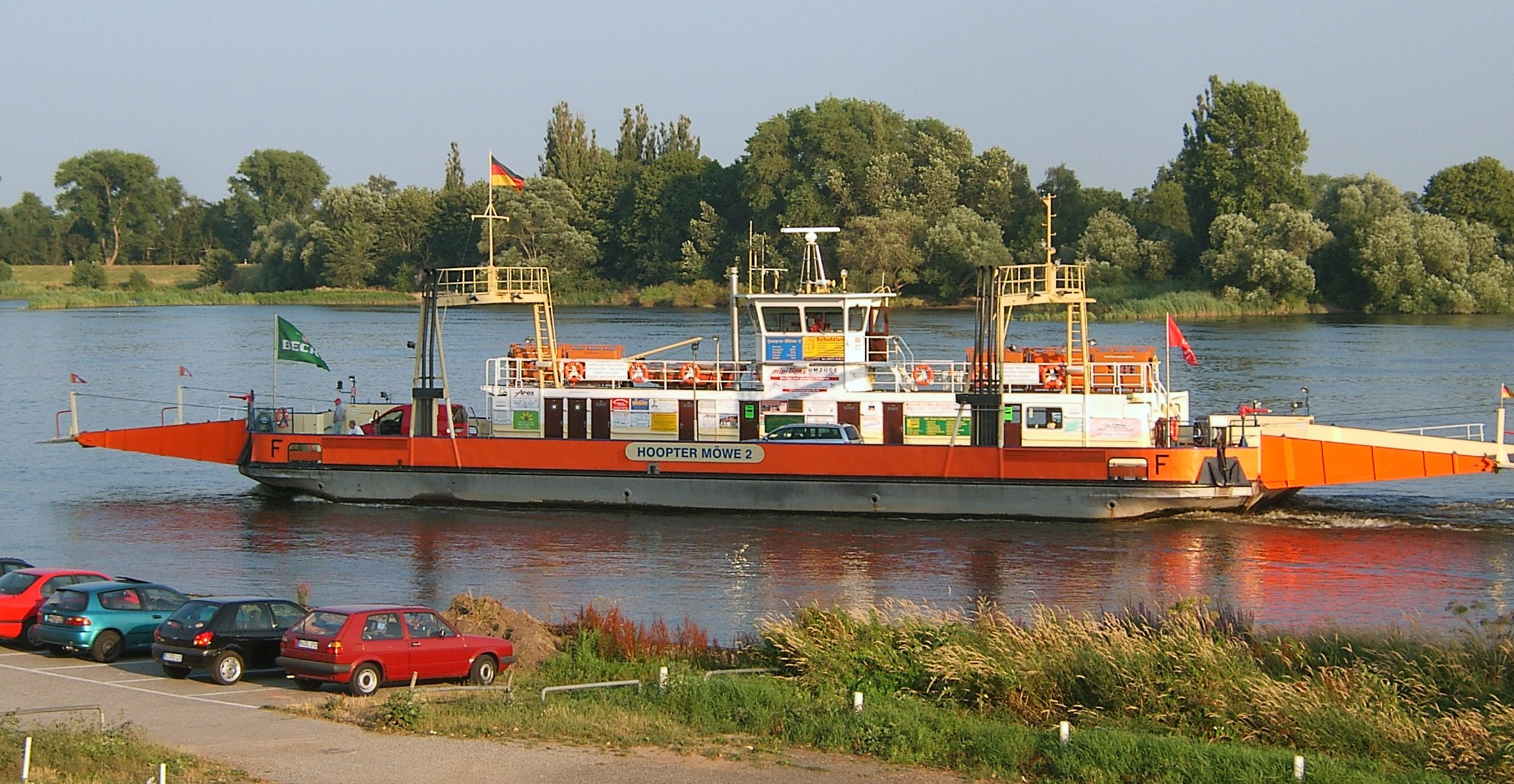 Elbfähre Zollenspieker, Hamburg